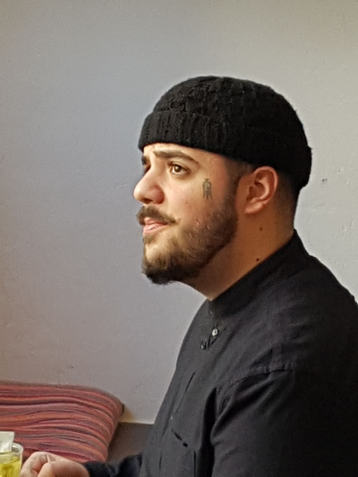 Foto Credibil